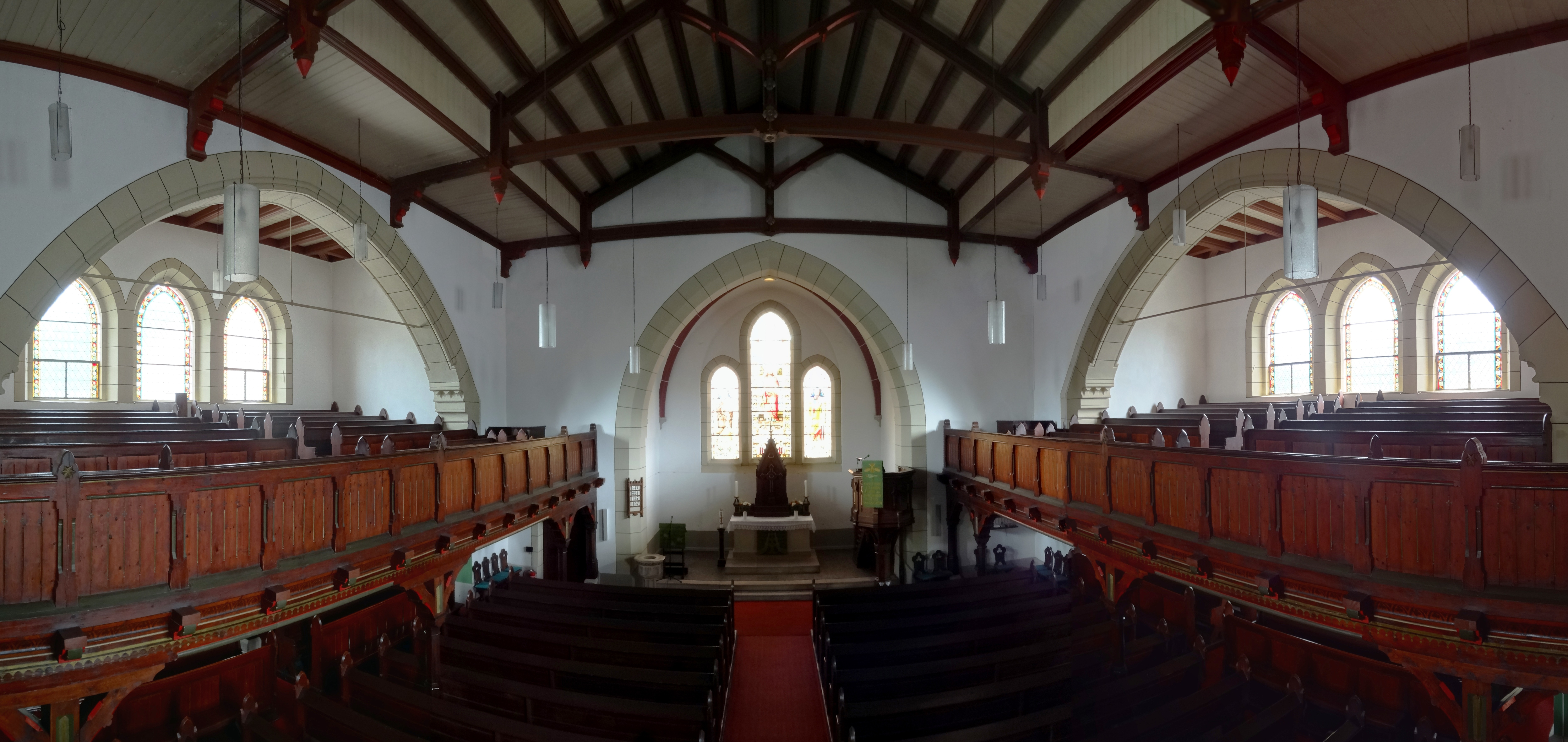 Innenraumpanorama St. Nicolai (Brotterode)